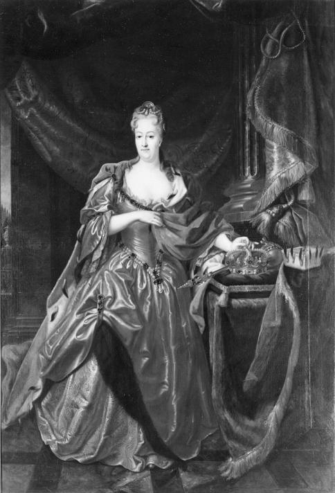 Christiane Eberhardine von Brandenburg-Bayreuth, Kurfürstin von Sachsen